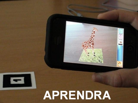 aprendra